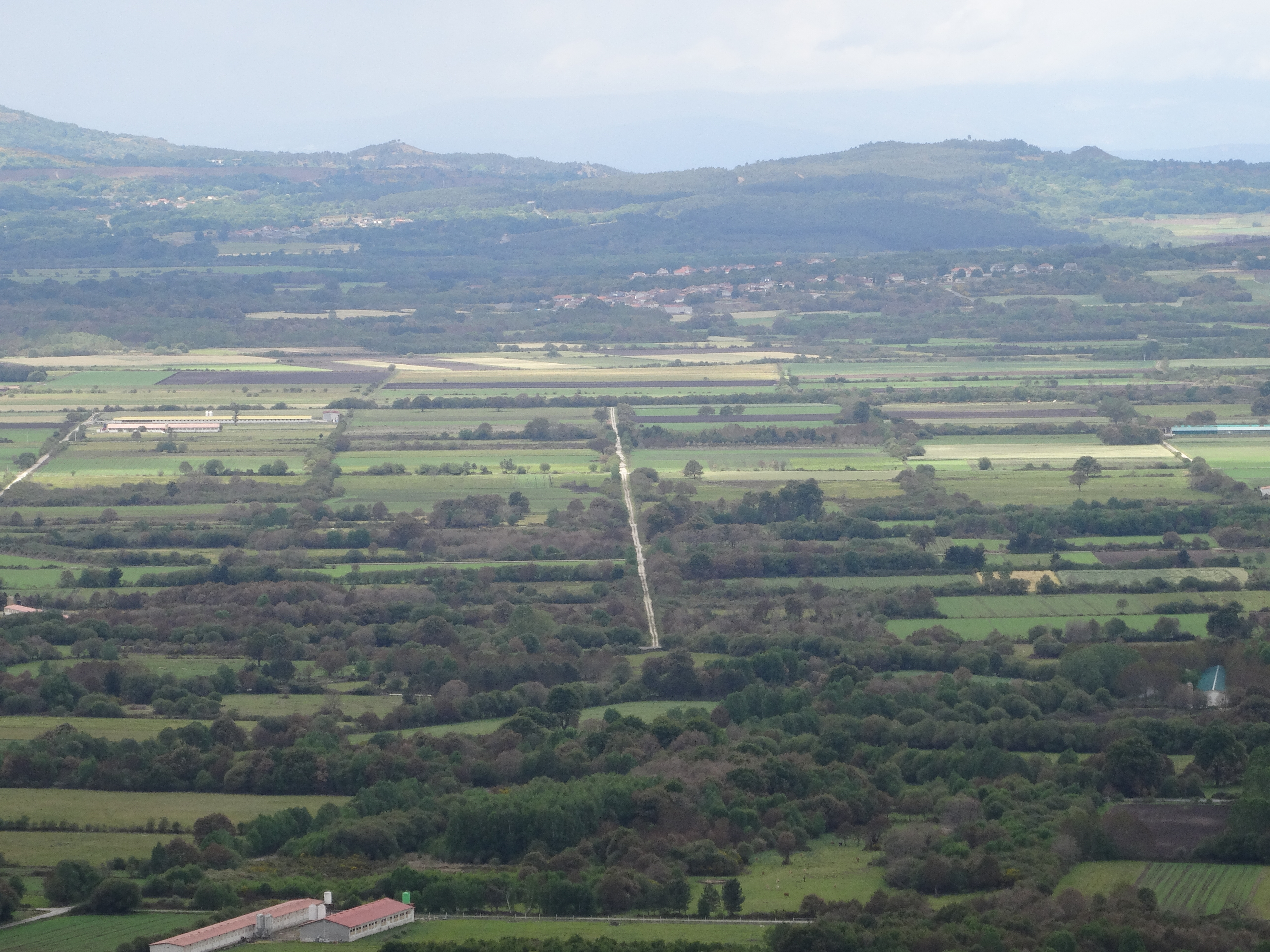 Vista da Limia dende preto do Veredo, Codosedo, Sarreaus.